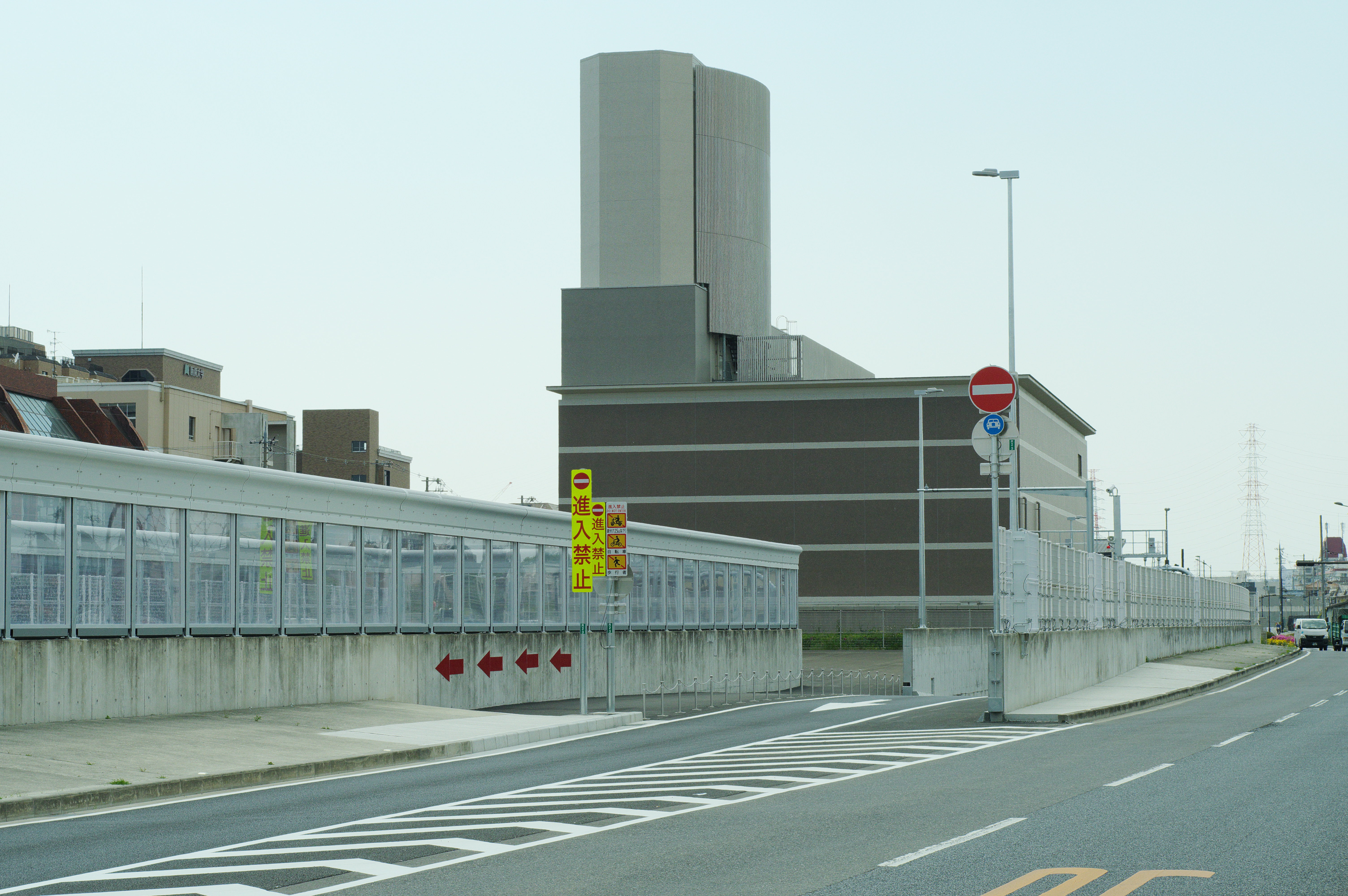 阪神高速6号大和川線 天美出口 大阪府道26号 大阪府松原市天美北